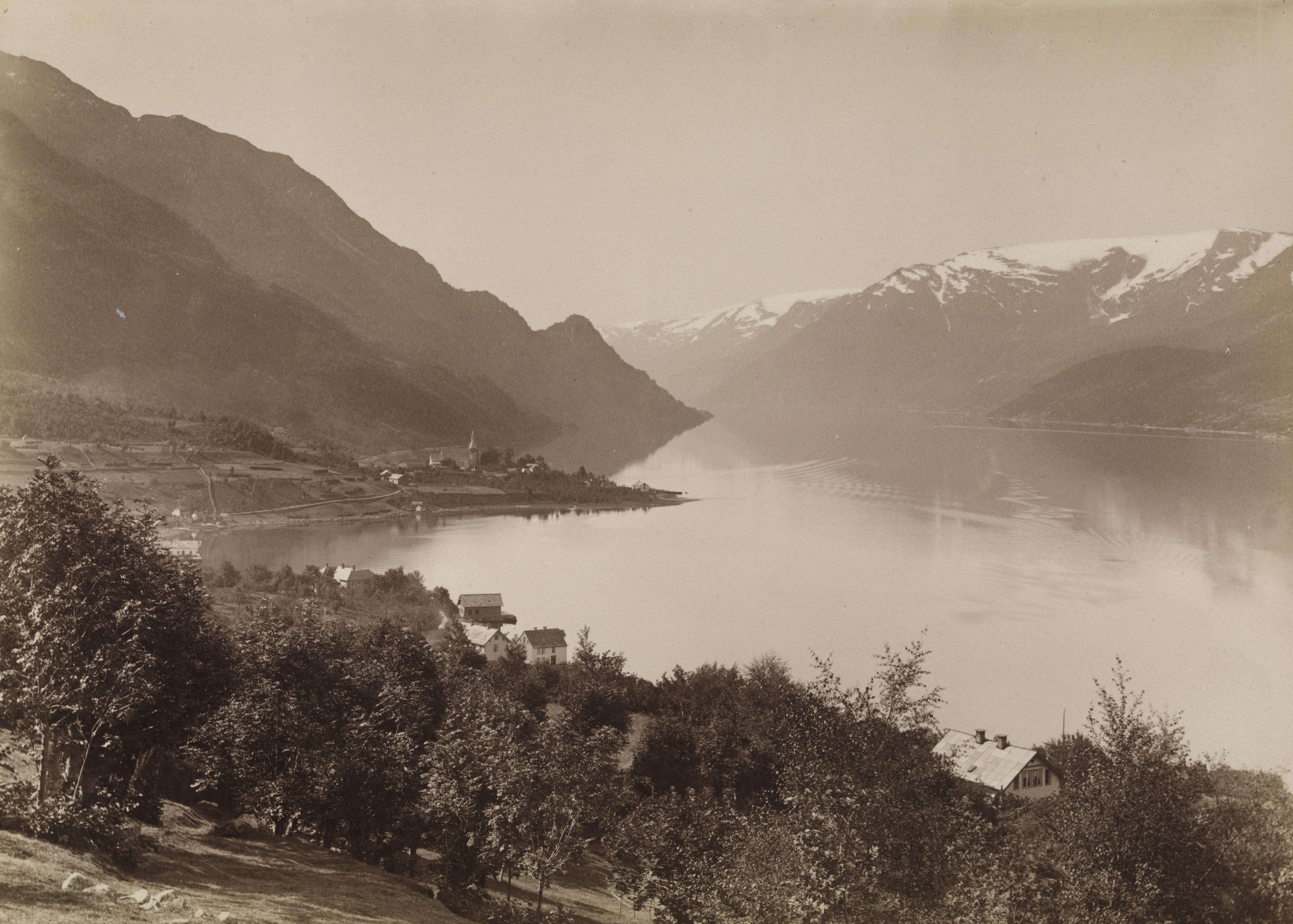 Sted: Lofthus Kommune: Ullensvang Fylke: Hordaland Tagger: landskapsfotografi